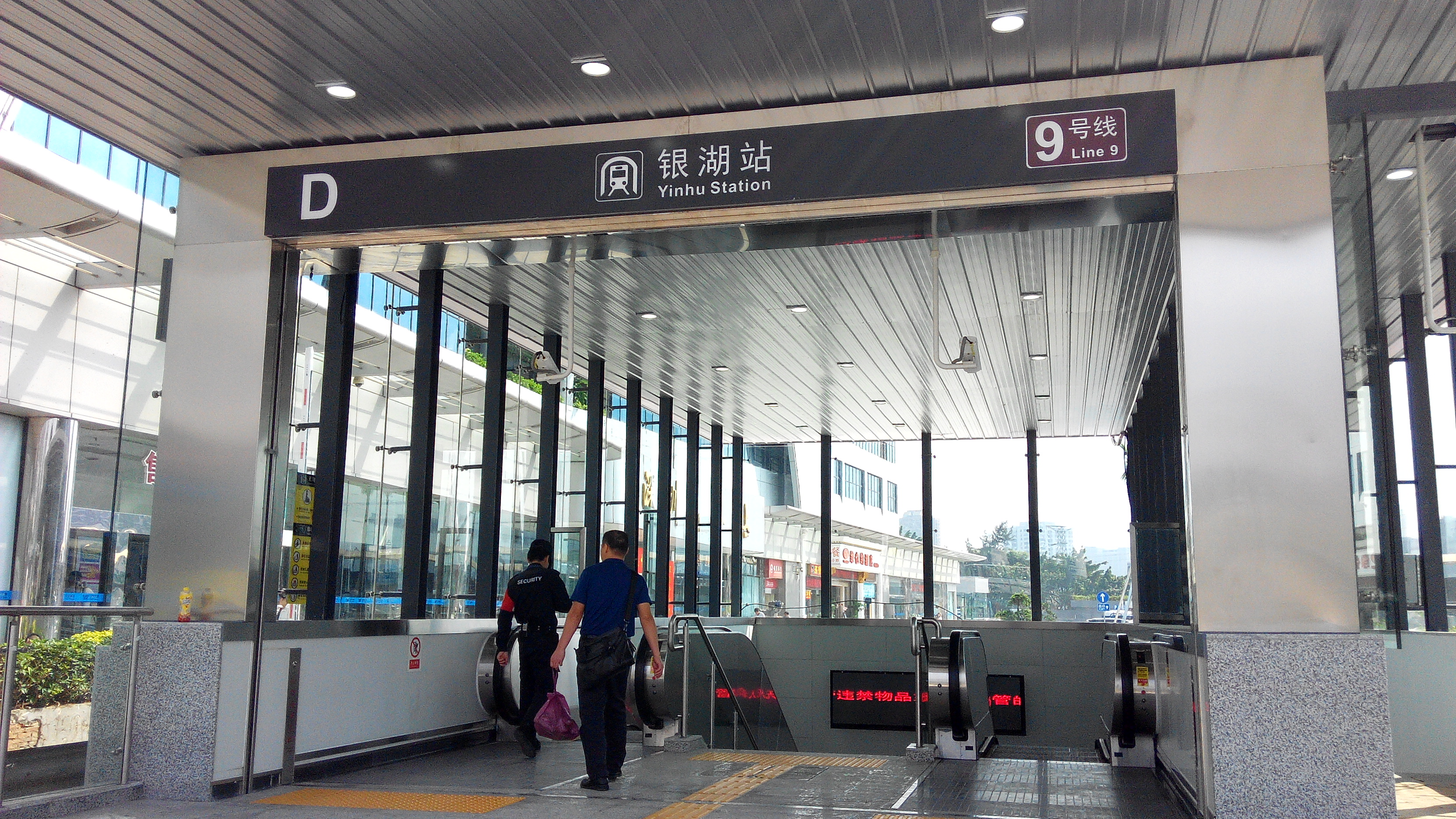 深圳地铁9号线 银湖站 D出口